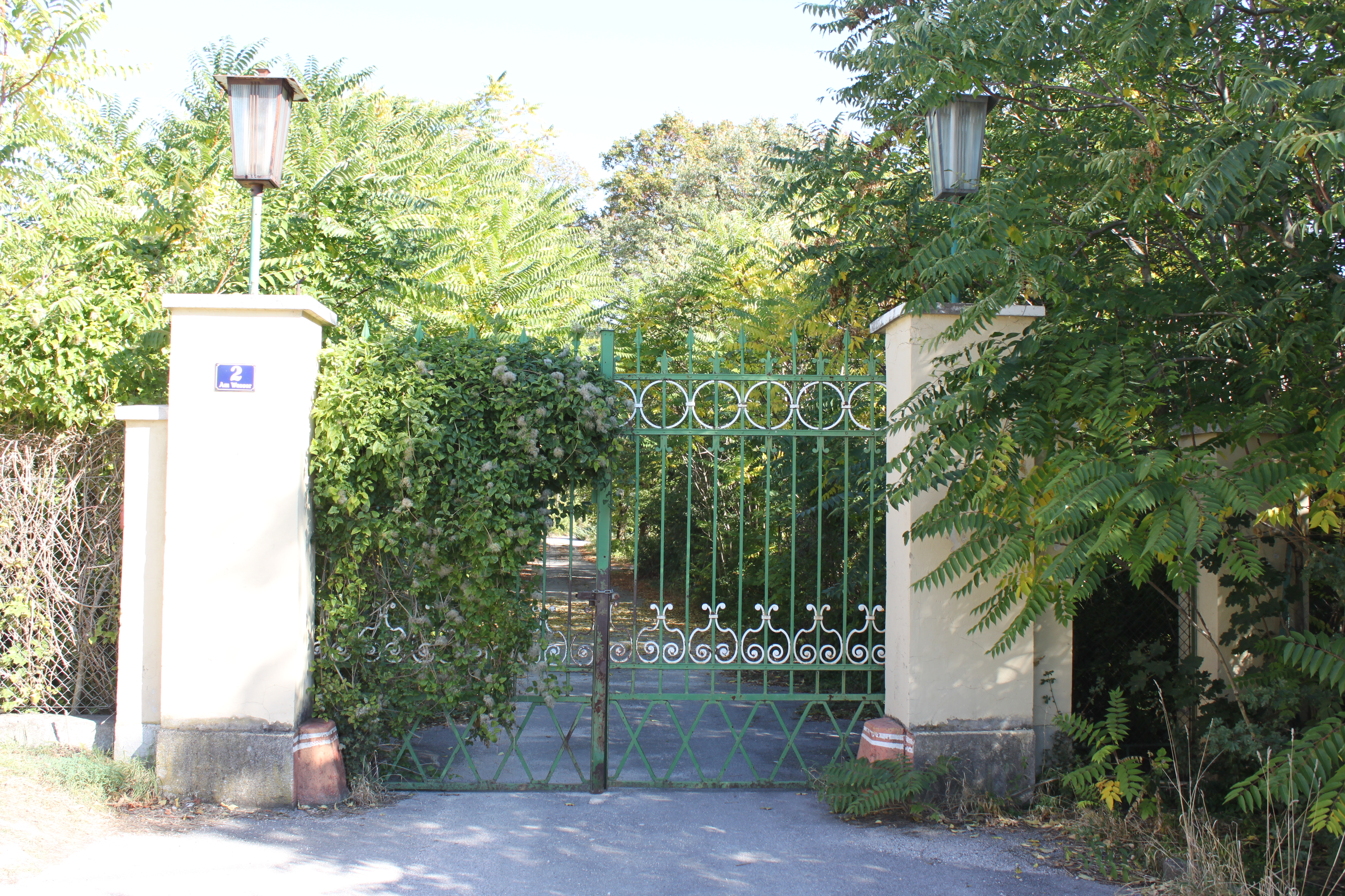 Eingangstor, bezeichnet mit: Am Wasser 2, mit Kette versperrt, teils überwachsen, rechts daneben, eigenes Foto, Steinblock als Steinmetzarbeit mit Babenbergerkaserne